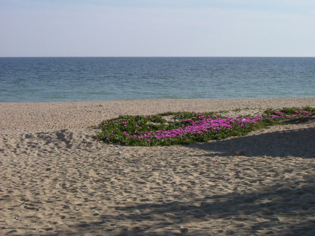 Flores sobre la arena de la playa de La Antilla, Lepe (Huelva).